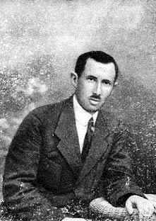 יעקב מלץ (משמאל)